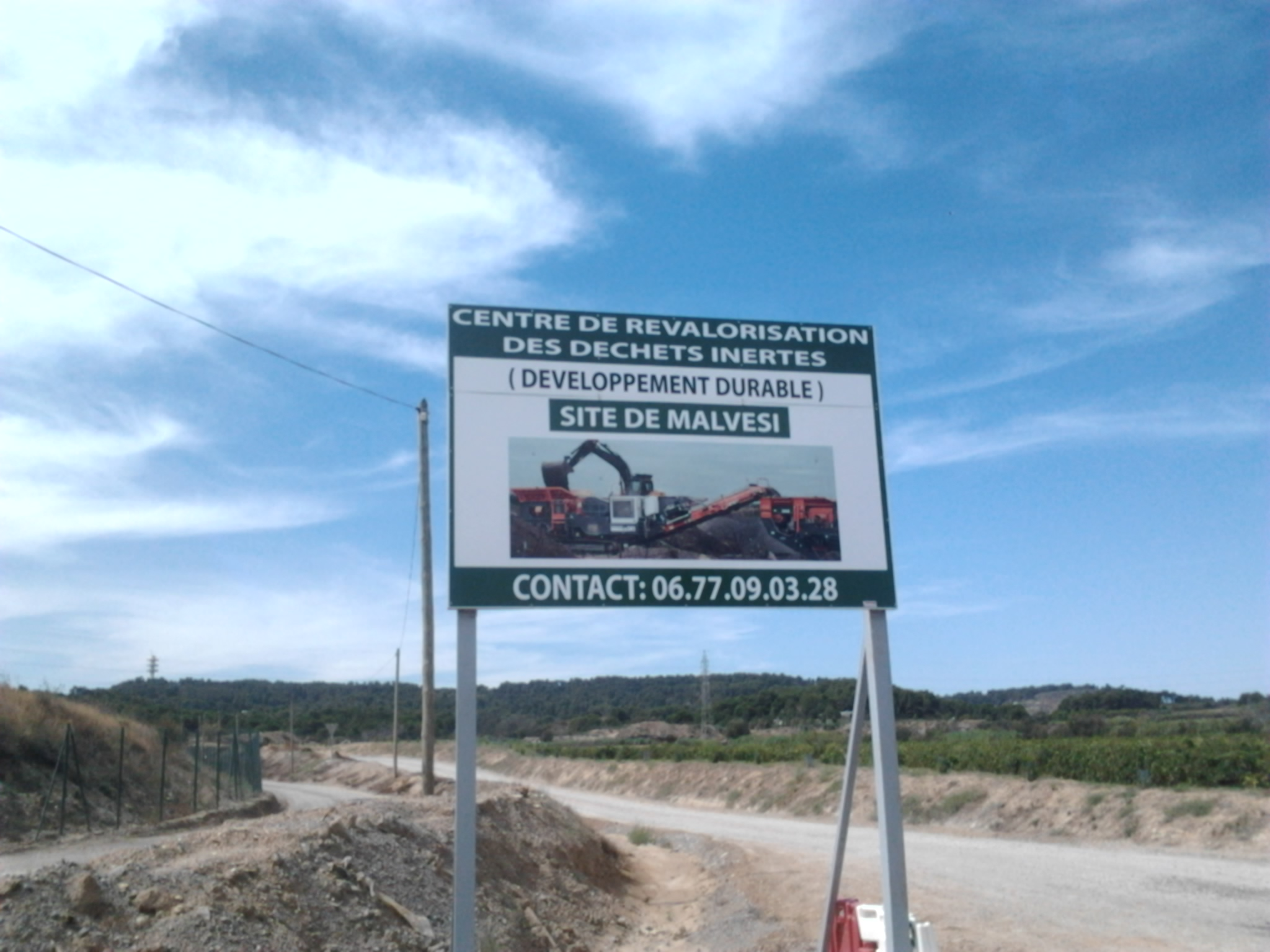 Pancarte située sur la Route de Malvési quelques mètres après l'usine (au nord du site).